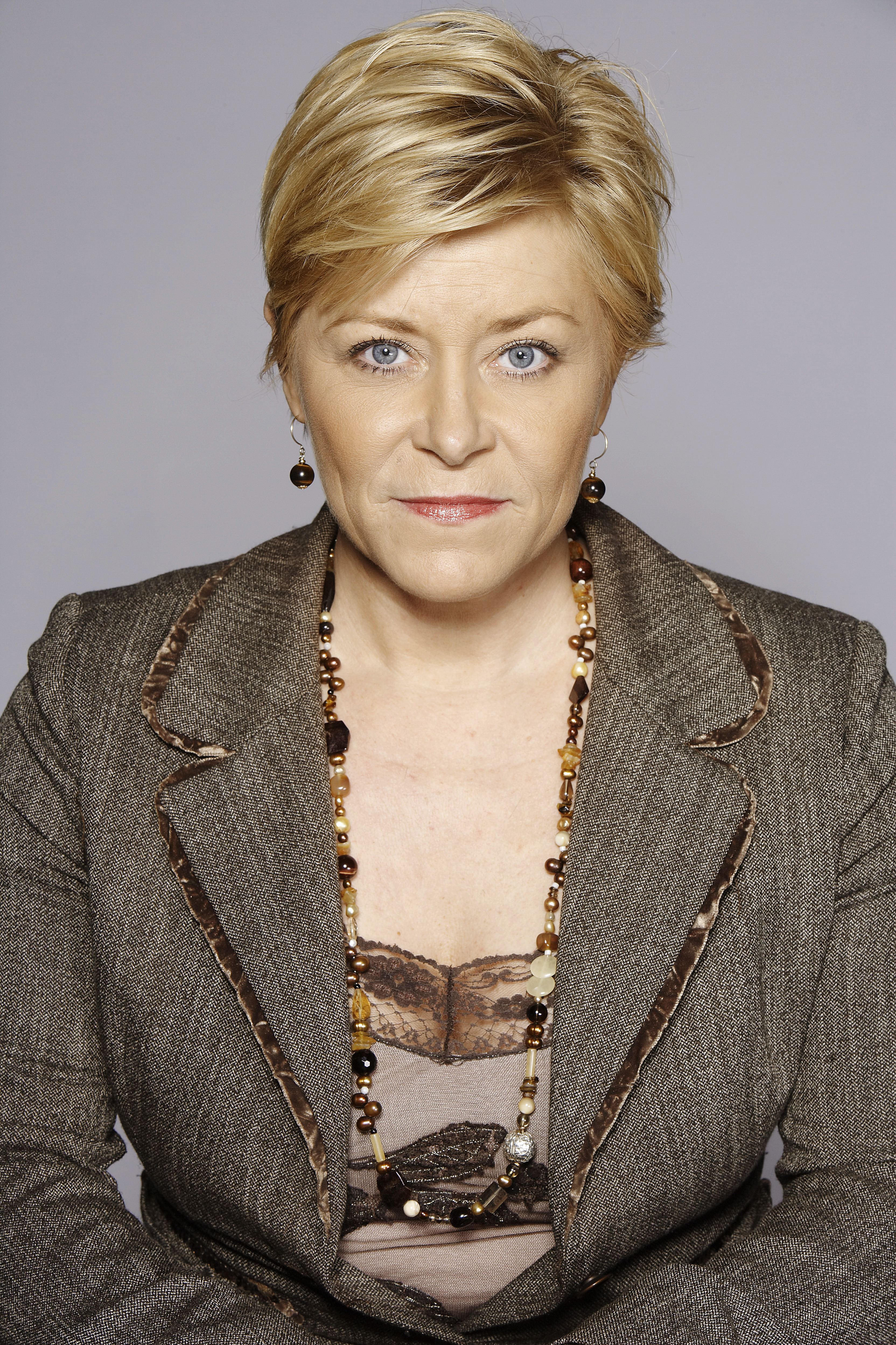 Siv Jensen, FrP-politiker